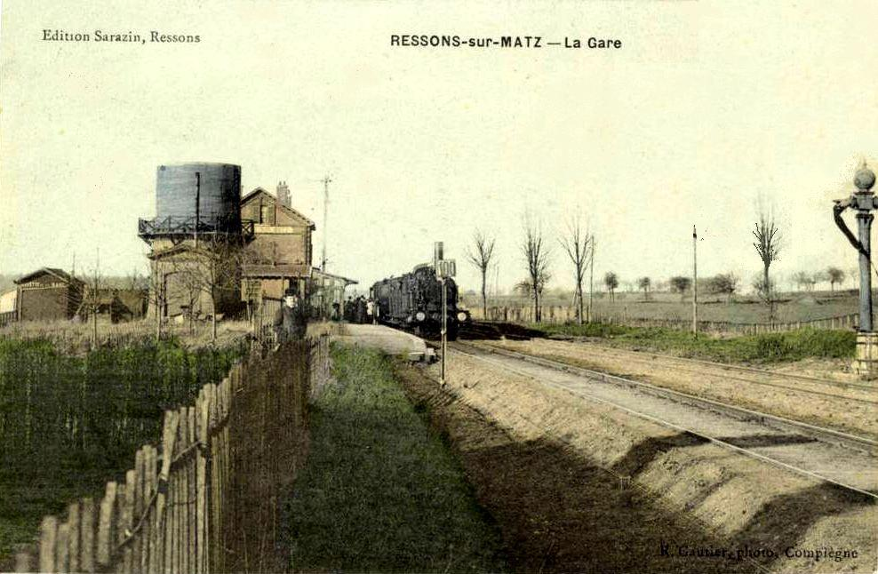 Vue générale de la gare côté voies.